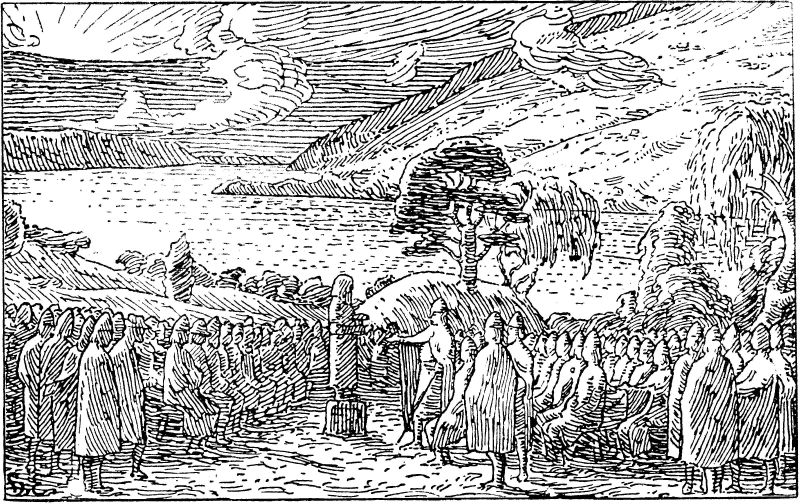 Halfdan Egedius: Illustration for Olav den helliges saga. Snorre 1899-edition. «Kong Olav taler med bønderne på Tinget ved Hundtorp.» nb: «Kong Olav taler til bøndene på tinget ved Hundorp.» nn: «Kong Olav talar til bøndene på tinget ved Hundorp.»